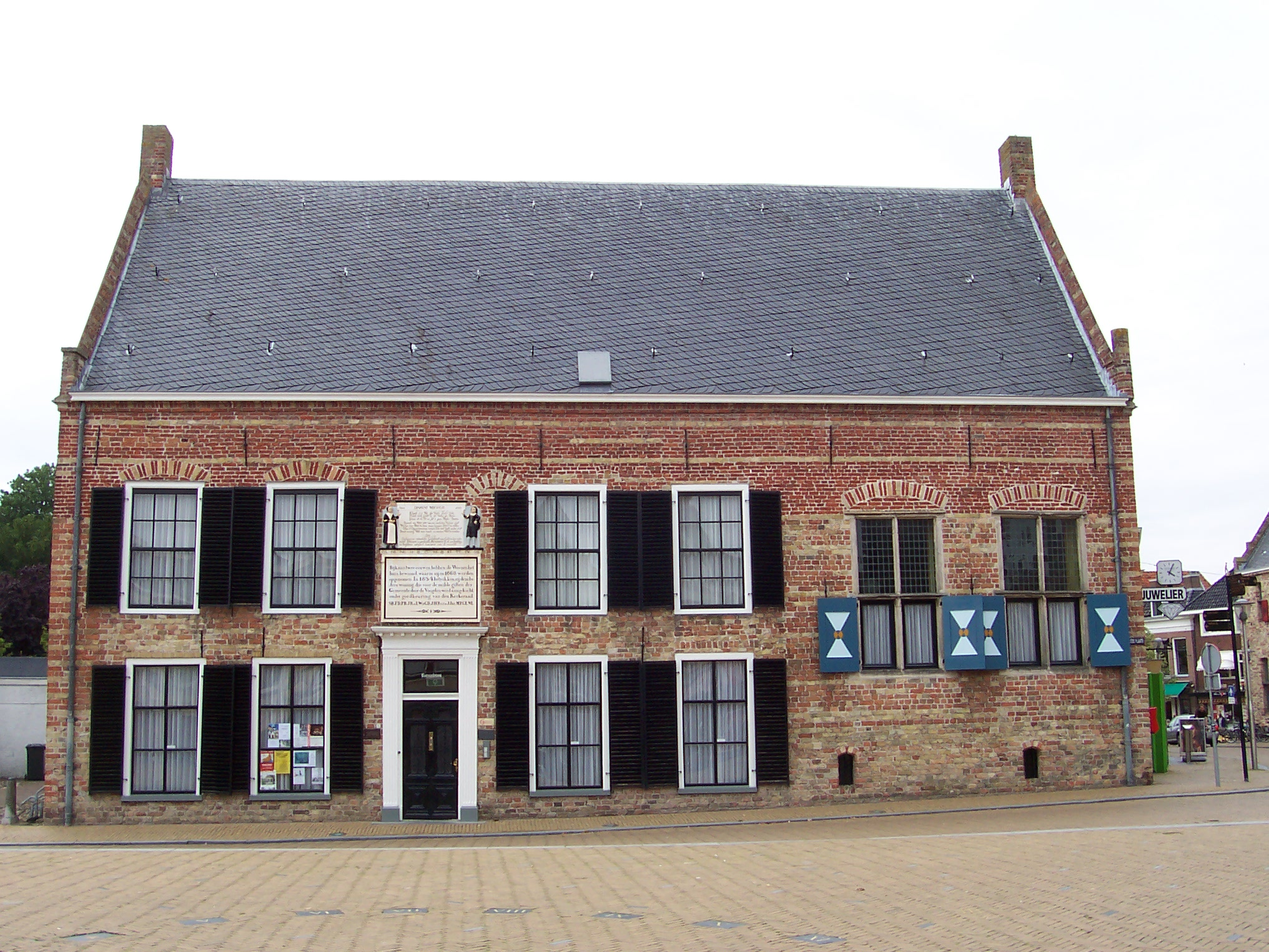 Frjentsjer, Botniastins